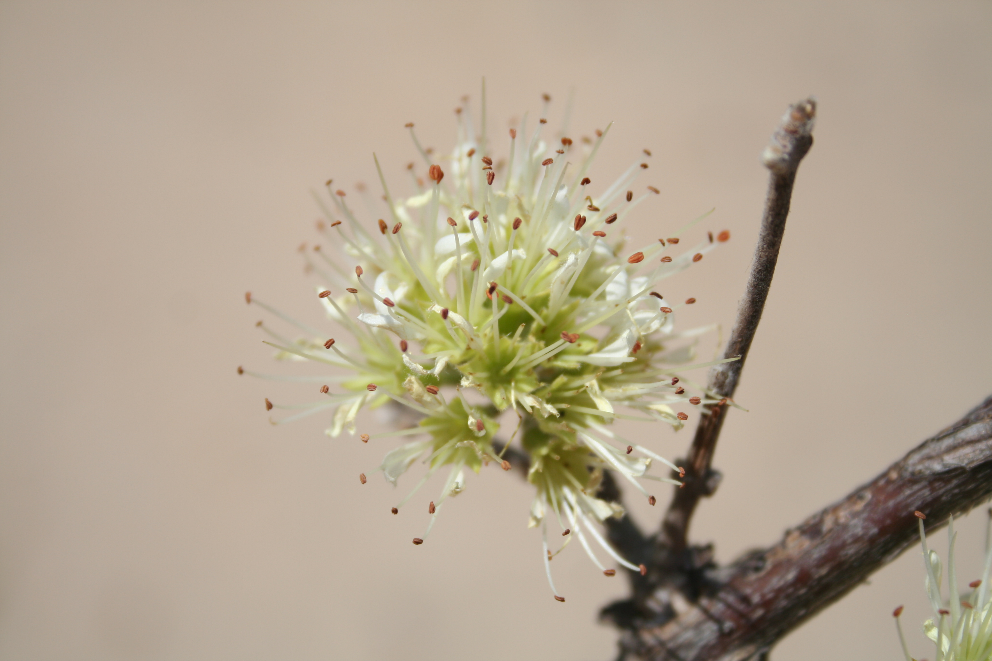 Combretum aculeatum at Mahangu NP, Namibia